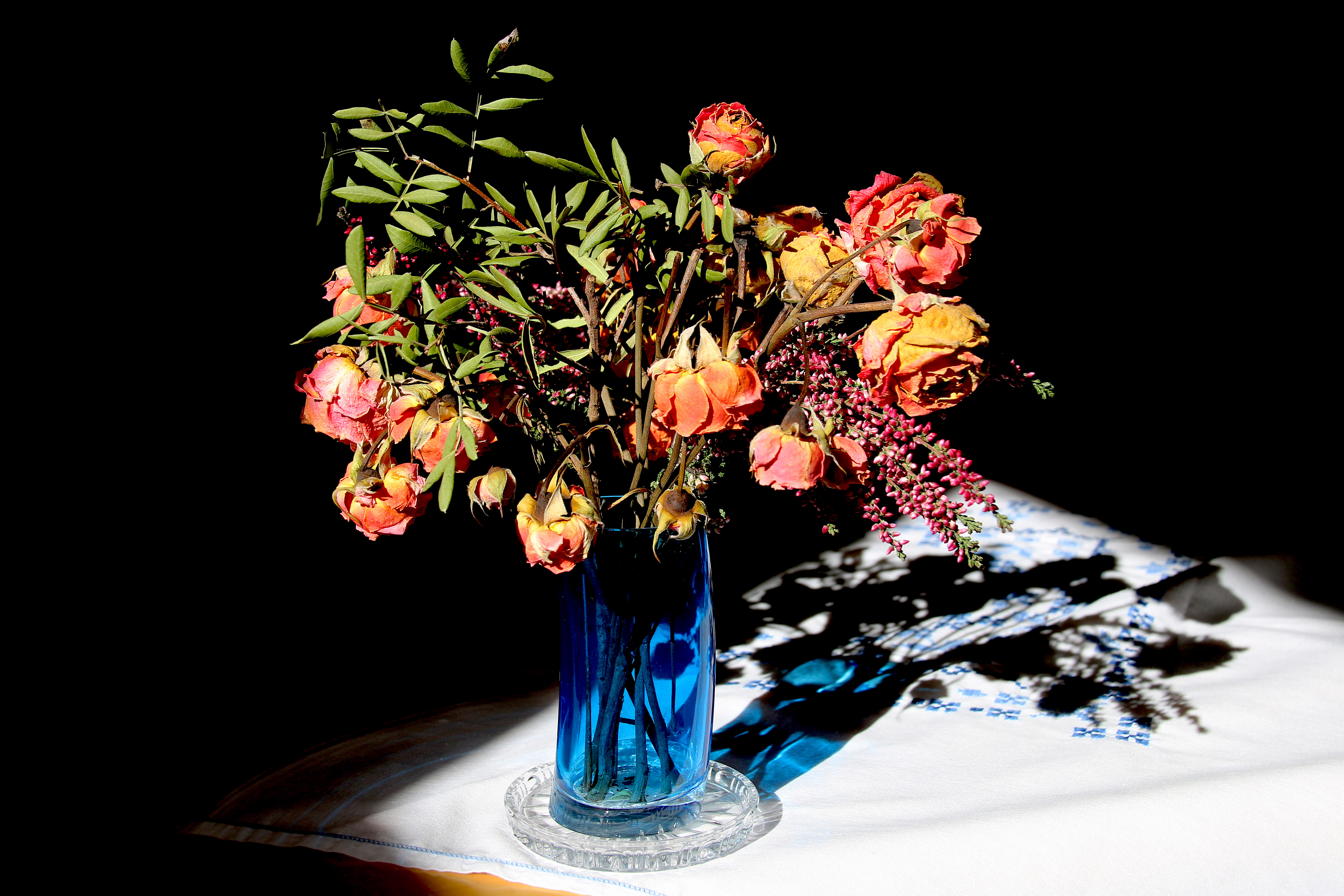 Trockenblumen